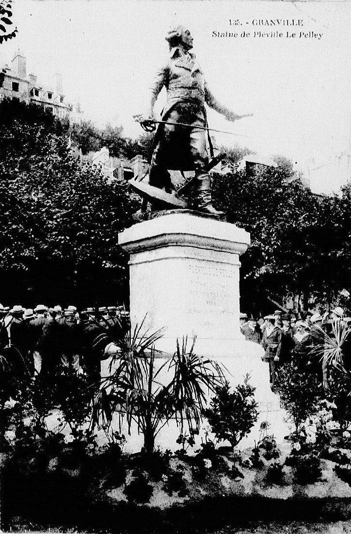 Statue de Pléville-Le-Pelley (oeuvre de Jean Magrou, fondue en 1942)